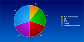 camenbert répartition